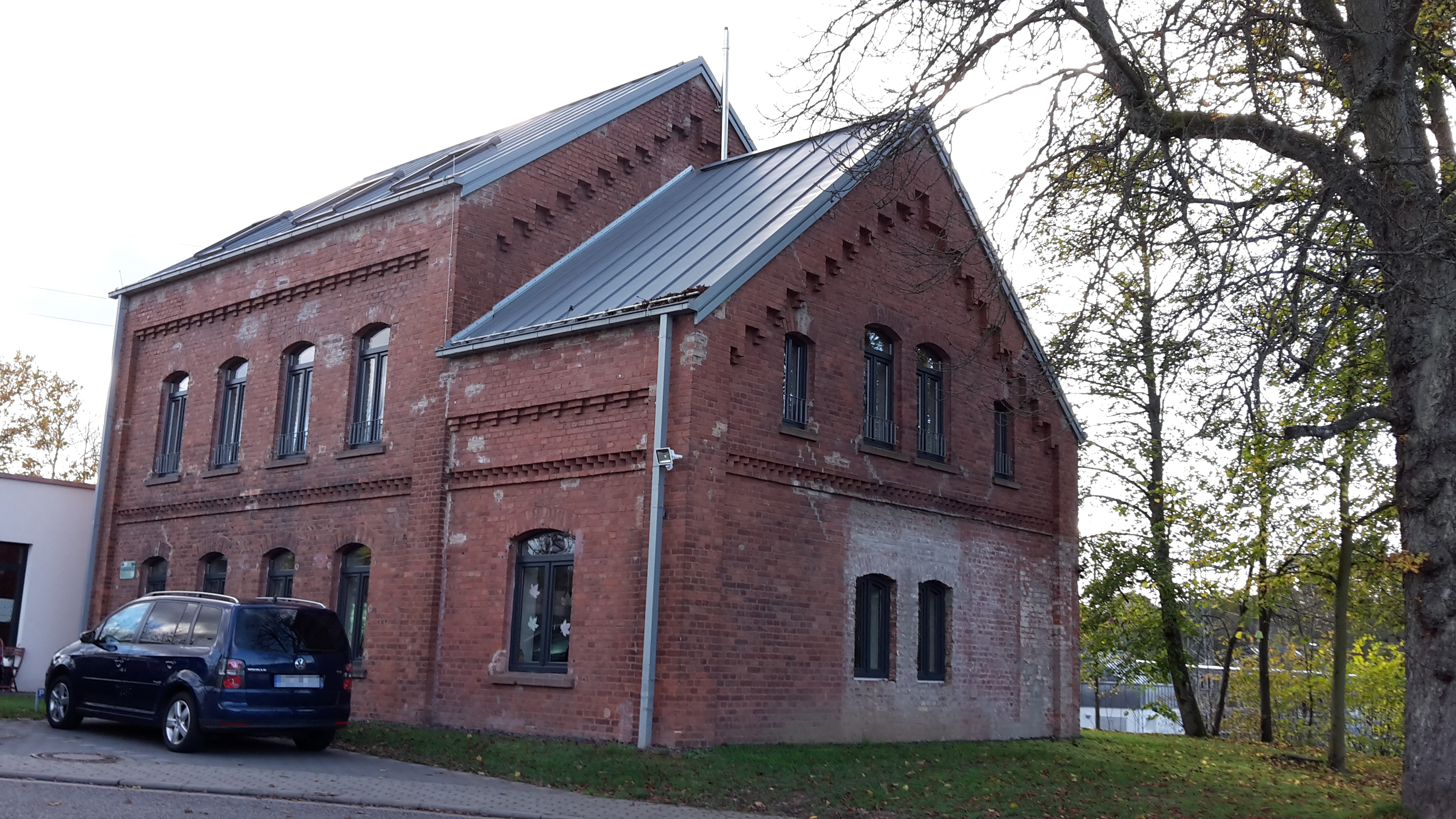 Familienzentrum Wadern (ehemaliger Bahnhof)